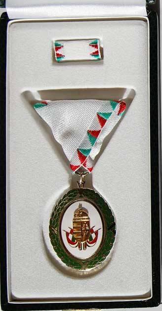 Szolgálati Érdemjel ezüst fokozata